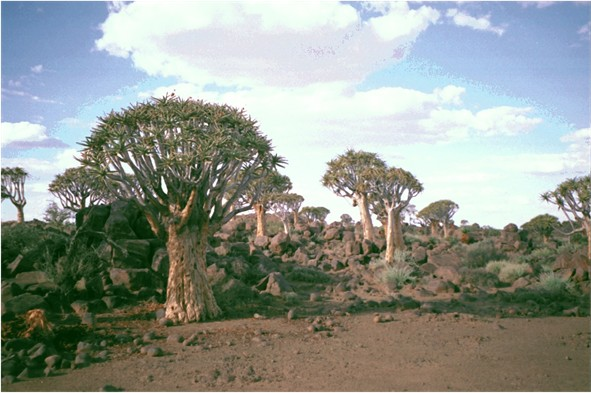 kokerbomen namibie